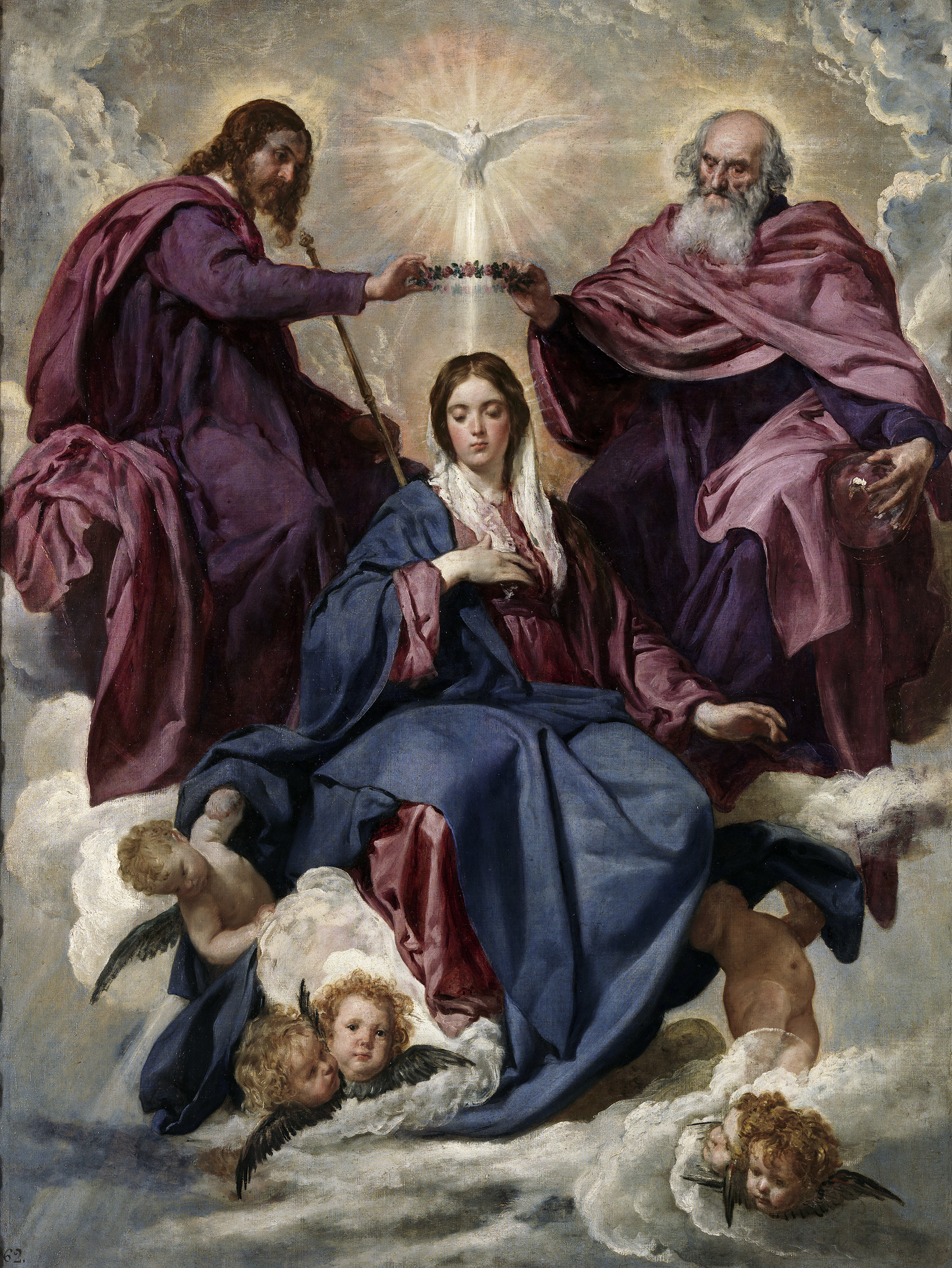 La obra representa la coronación de la Virgen María, madre de Jesucristo, por los tres miembros de la Santísima Trinidad.